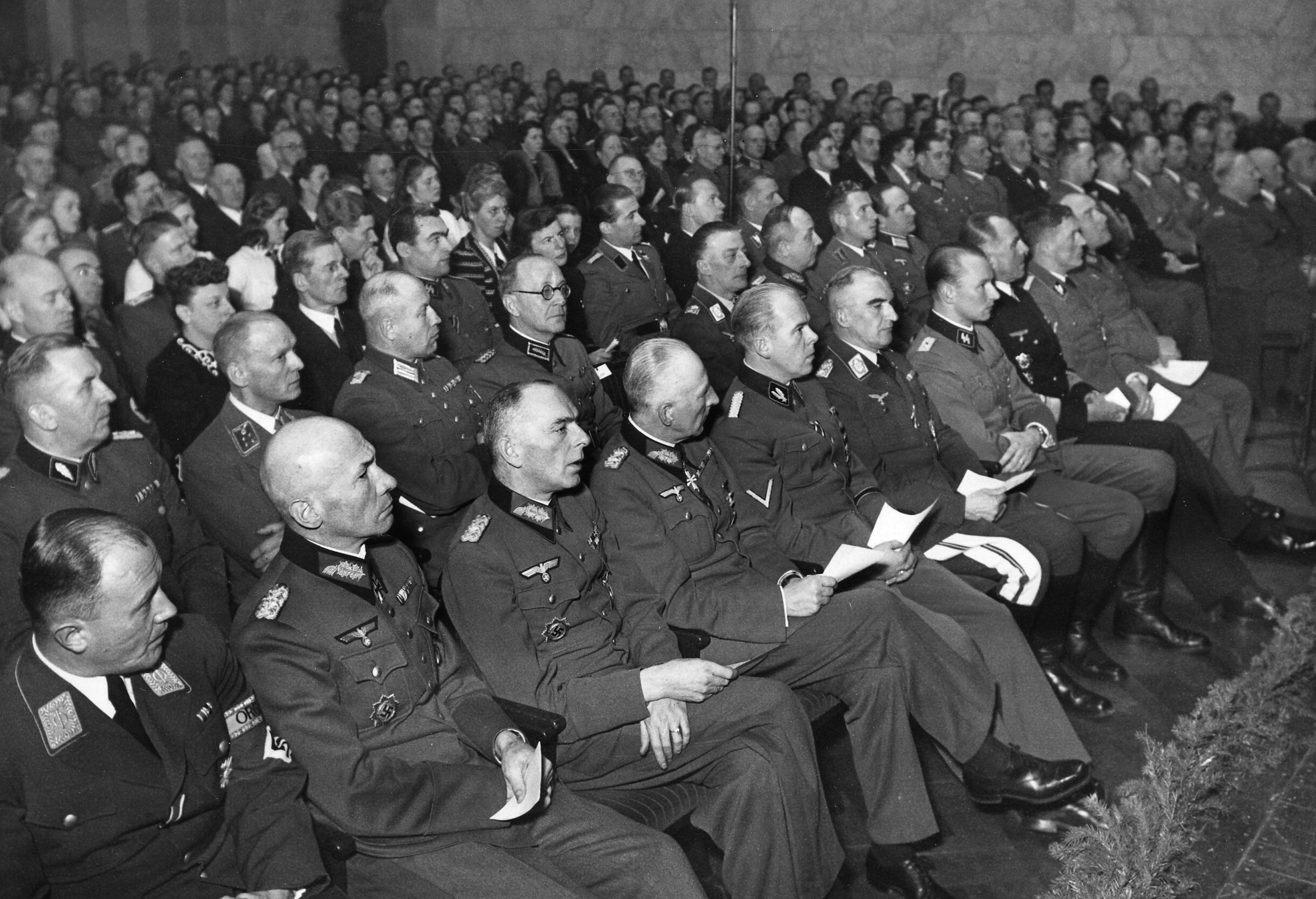 1943/11/09. RA/RAFA-3309/U 44B/14/44-14-11 img497 Nasjonal Samling, forkortet NS, var et norsk politisk parti som ble grunnlagt av Vidkun Quisling i 1933 og ble oppløst ved frigjøringa i 1945. Ideologisk fulgte partiet den tyske nasjonalsosialismen, og NS ble støtteorganisasjon for den tyske okkupasjonsmakta i Norge under andre verdenskrig.